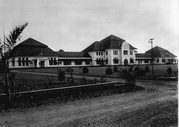 Foto. Tegenwoordig het gebouw van Biofarma. 's Lands Koepok Inrichting en het Instituut Pasteur, exterieur van het gebouw, Bandoeng.